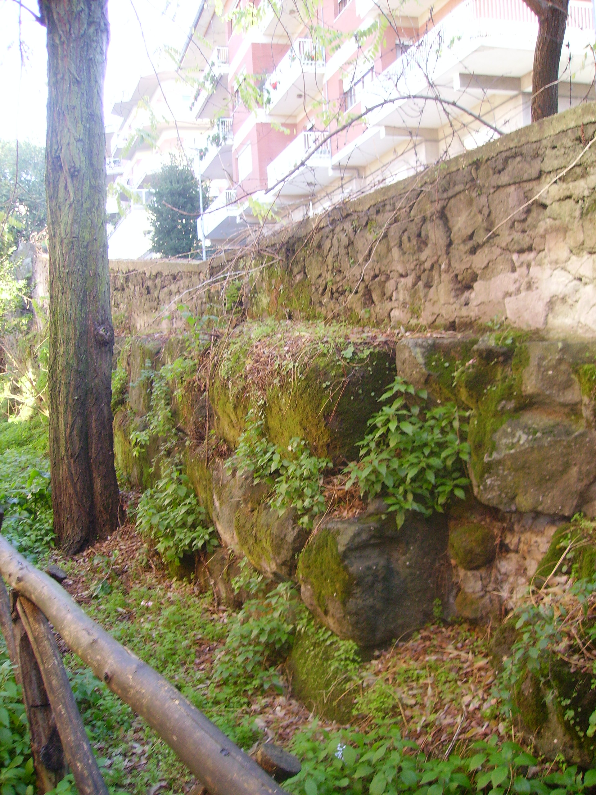 Le mura dei Castra Albana nella recinzione del Liceo Classico Ugo Foscolo ad Albano Laziale.